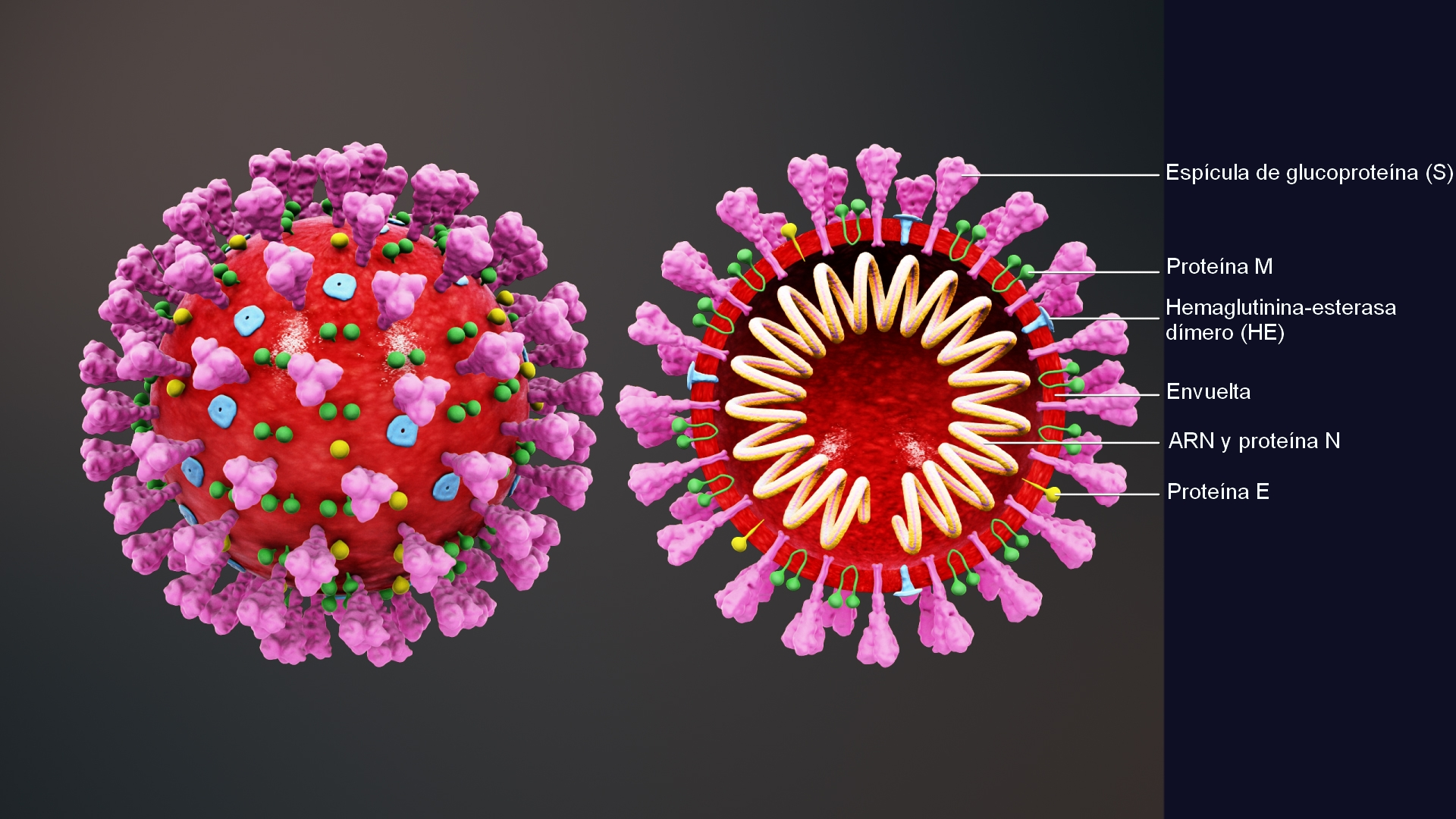 Representación tridimensional en la que se muestran las cuatro proteínas de superficie del virus: E, S, M, HE.